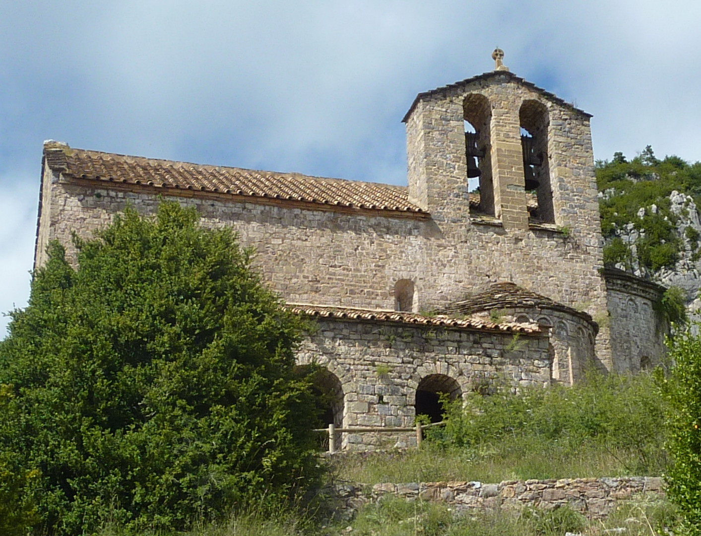 Pòrtic i campanar de cadireta a Sant Pere de Montgrony